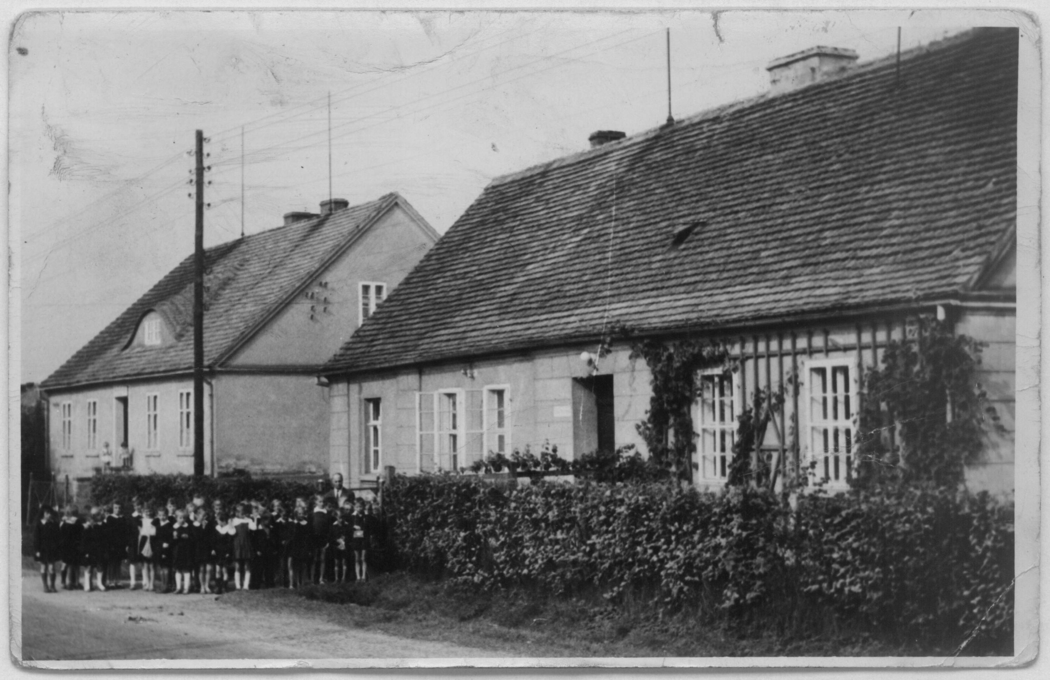 Szkoła i budynek nauczycielski w Kłodzie, (skan zdjęcia tradycyjnego z akcji zbierania starych fotografii w Kłodzie)